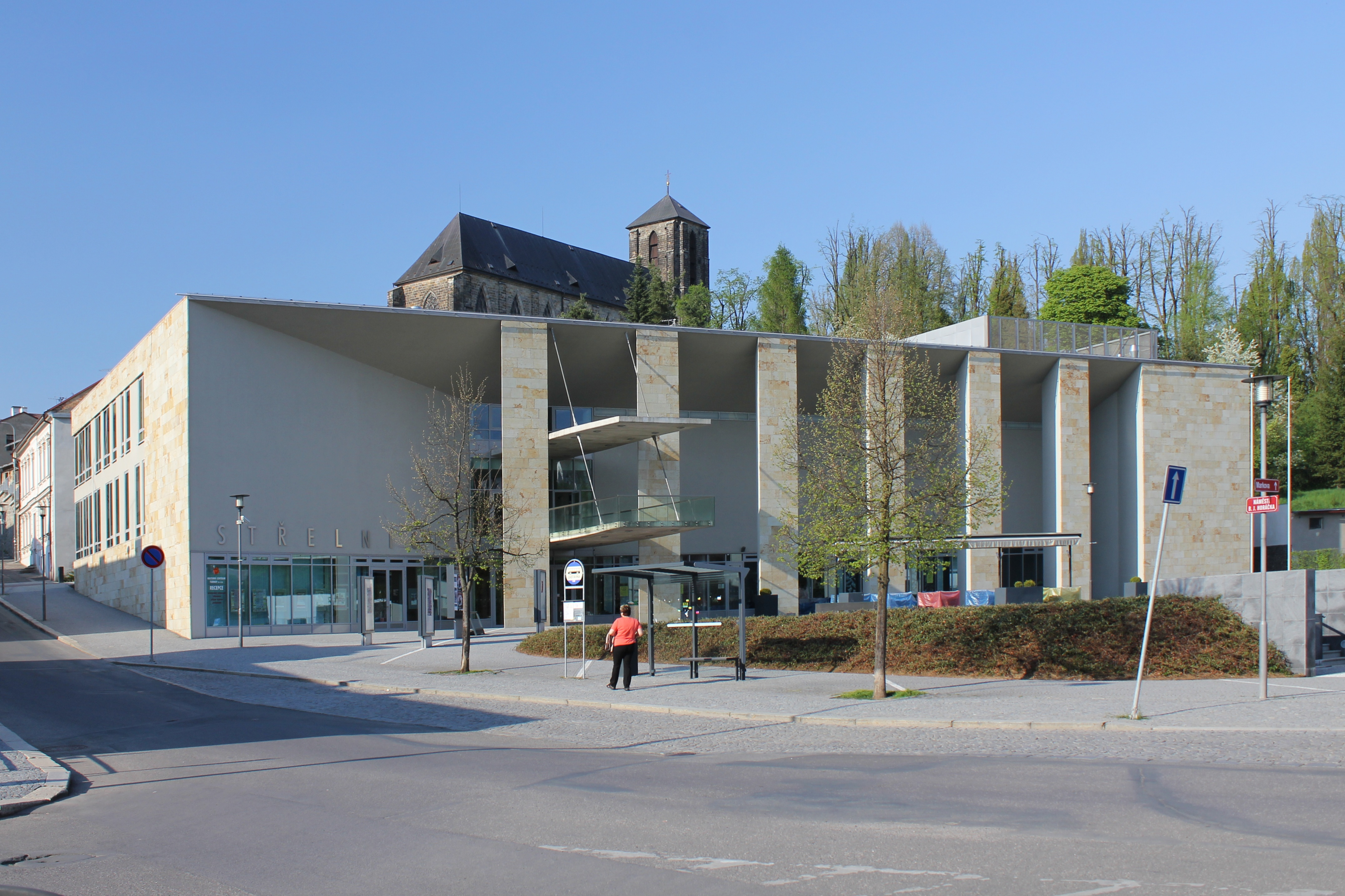 Kulturní centrum "Střelnice", chrám Narození Panny Marie